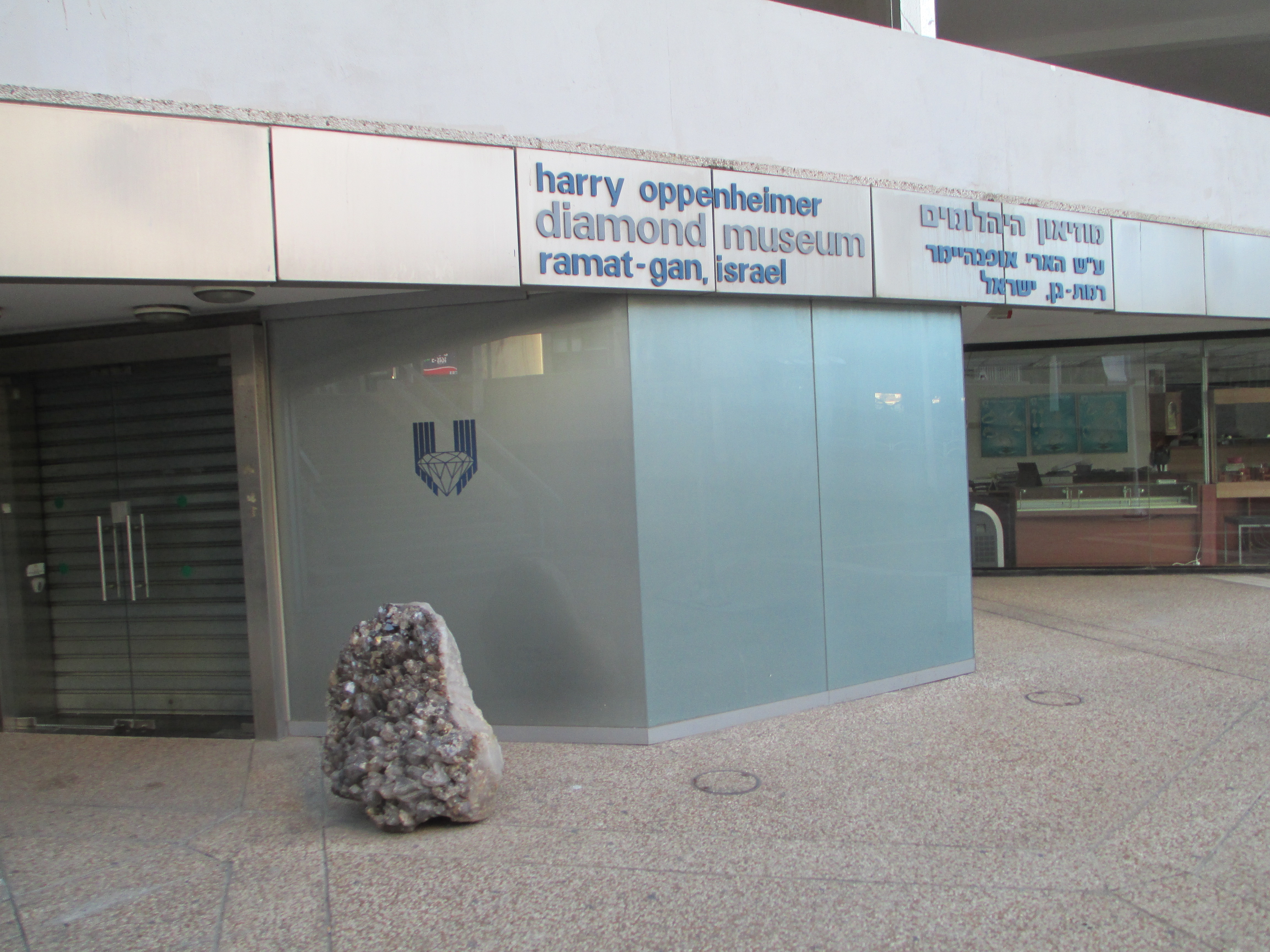 מוזיאון היהלומים במתחם הבורסה ברמת גן